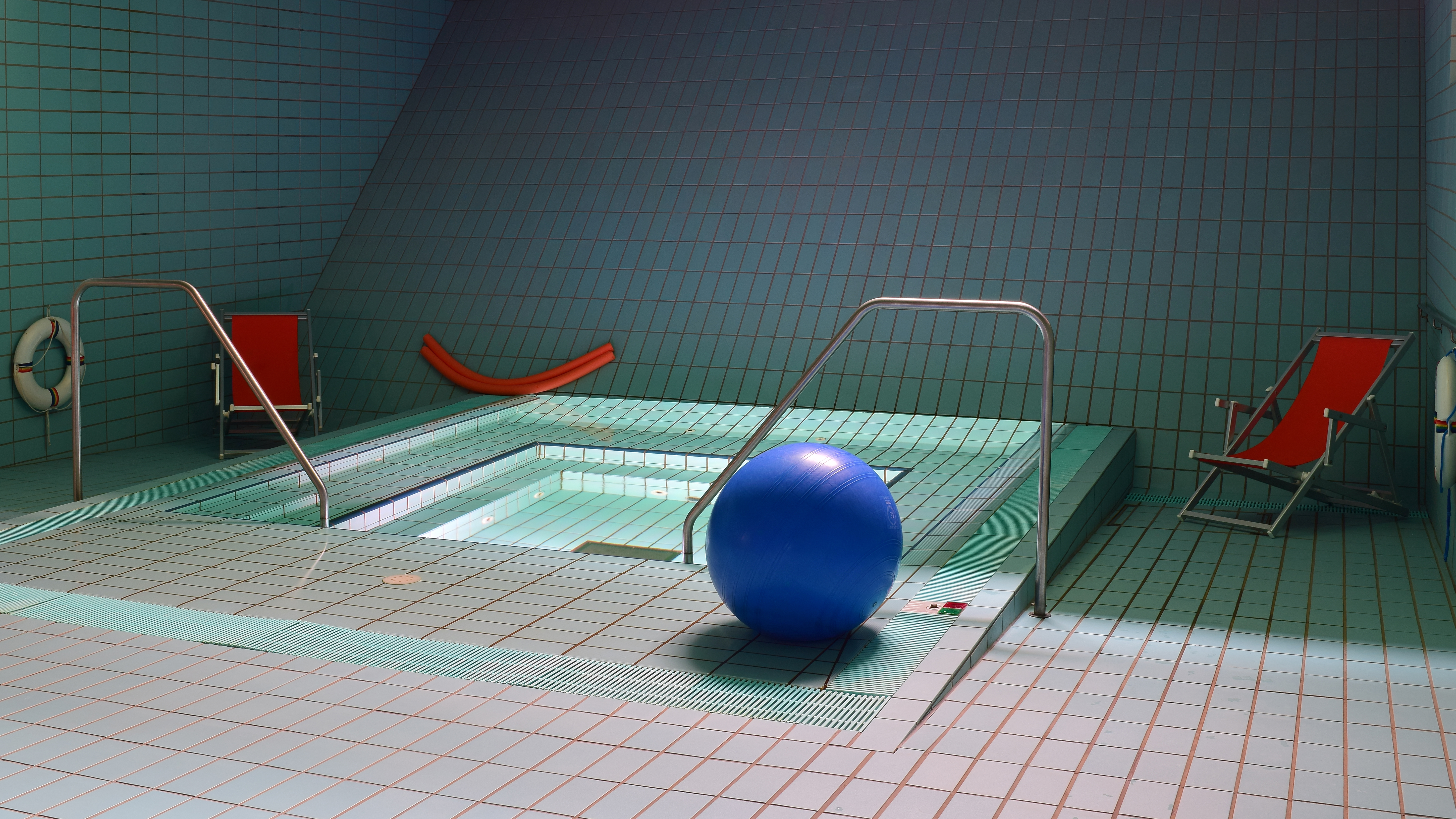 In der ehemaligen Sargfabrik in Wien-Penzing verwirklichte der Verein für Integrative Lebensgestaltung im Jahr 1996 ein Wohn- und Kulturprojekt. Darin befinden sich neben Wohnungen ein Kulturhaus, ein Badehaus, ein Seminarraum, ein Kinderhaus und ein Café-Restaurant. Näheres in diesem PDF.